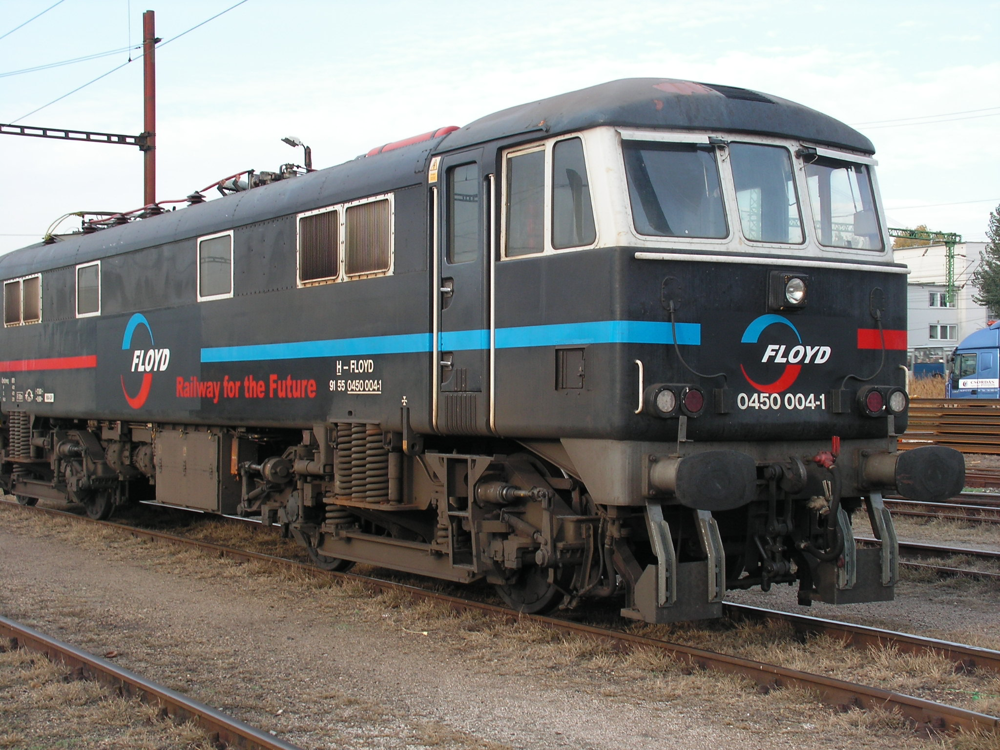 A Floyd Zrt 2004. 06. 14-én kezdte meg működését, székhelye Budapesten van. A társaság elsősorban tranzit árufuvarozással foglalkozik. Állományokba tartoznak többek között a 450-es sorozatú mozdonyok is, melyek eredetileg British Rail 86 sorozat tagjai voltak.